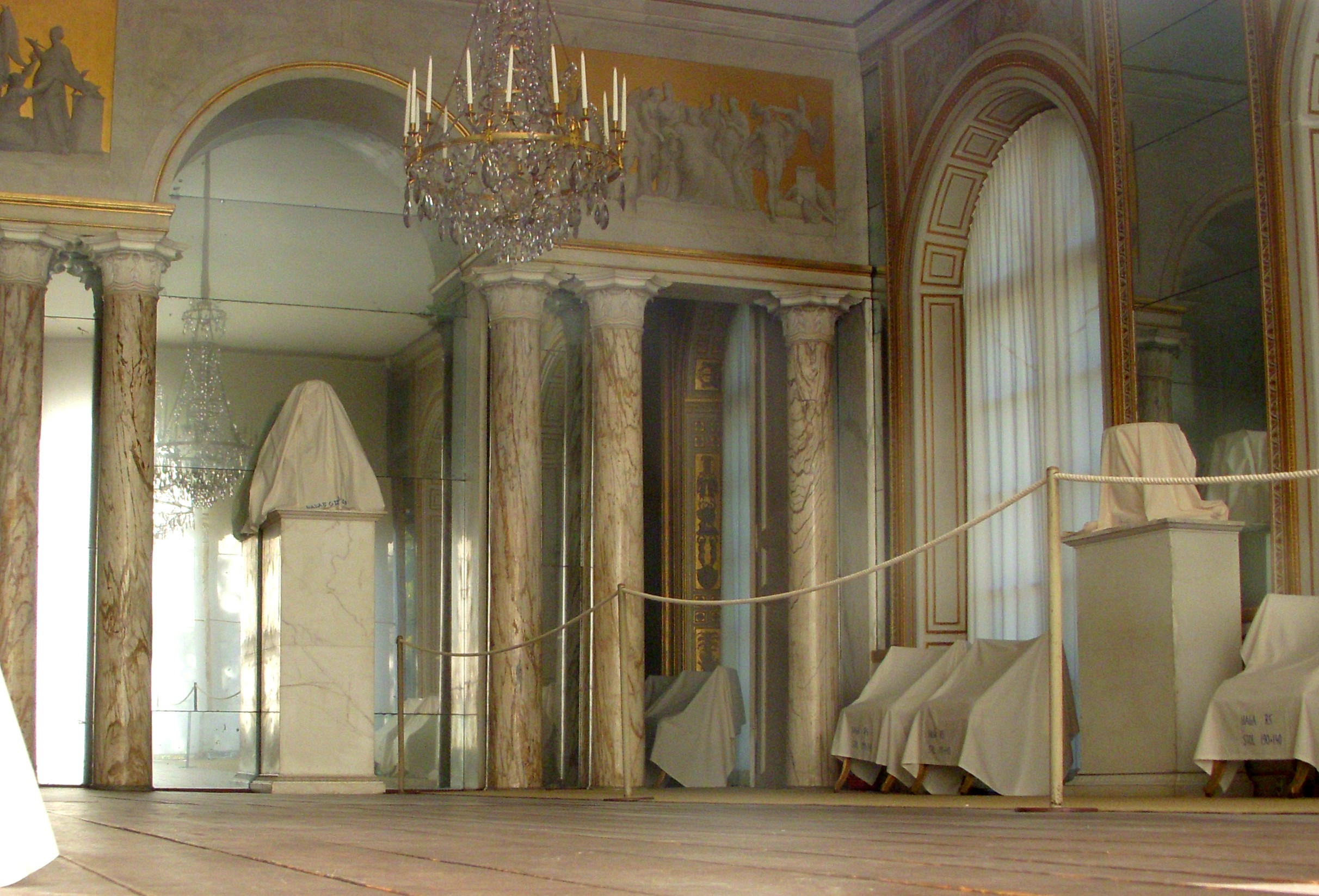 Gustav III:s paviljong i Hagaparken, Spegelsalongen, interiör